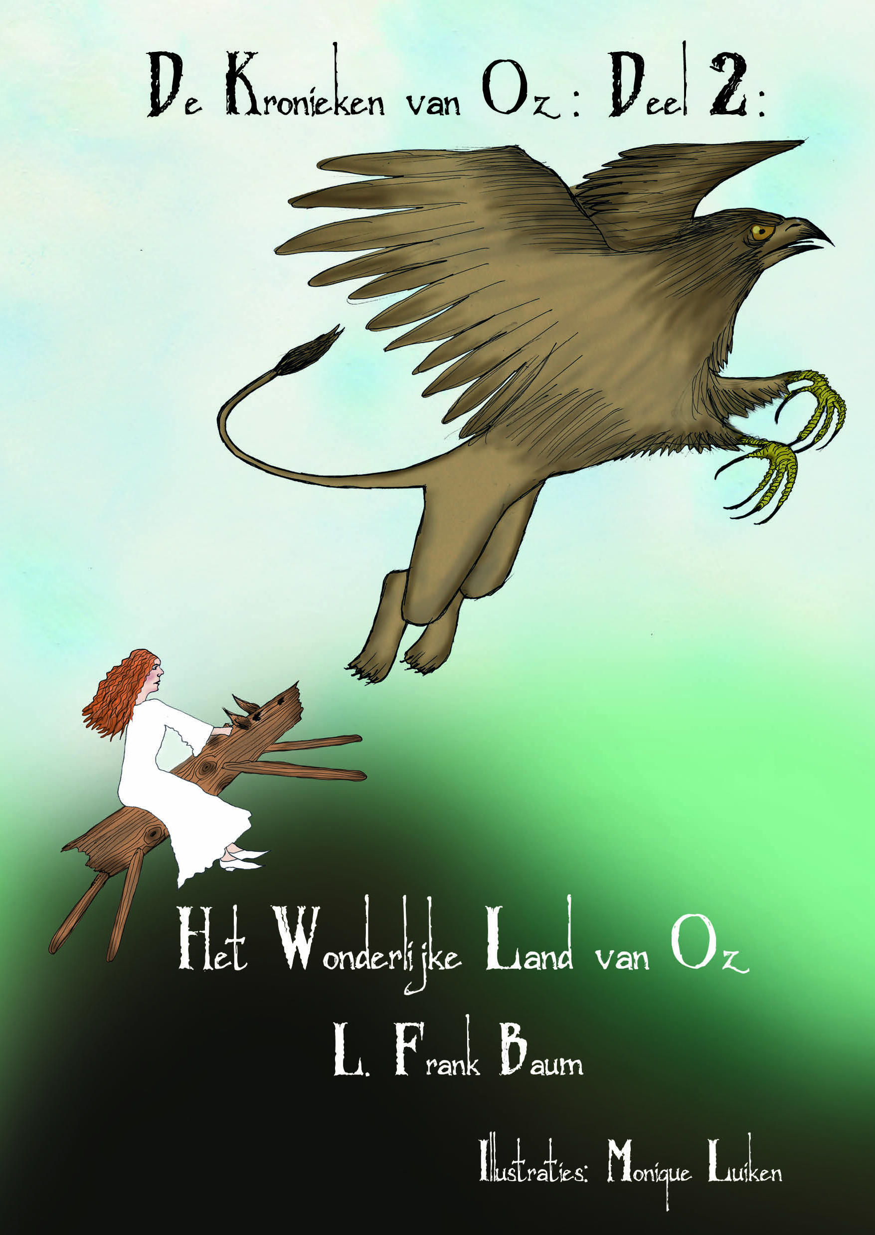 Kaft afbeelding van Het Wonderlijke Land van Oz (rechtstreeks van de uitgever, met zijn toestemming).